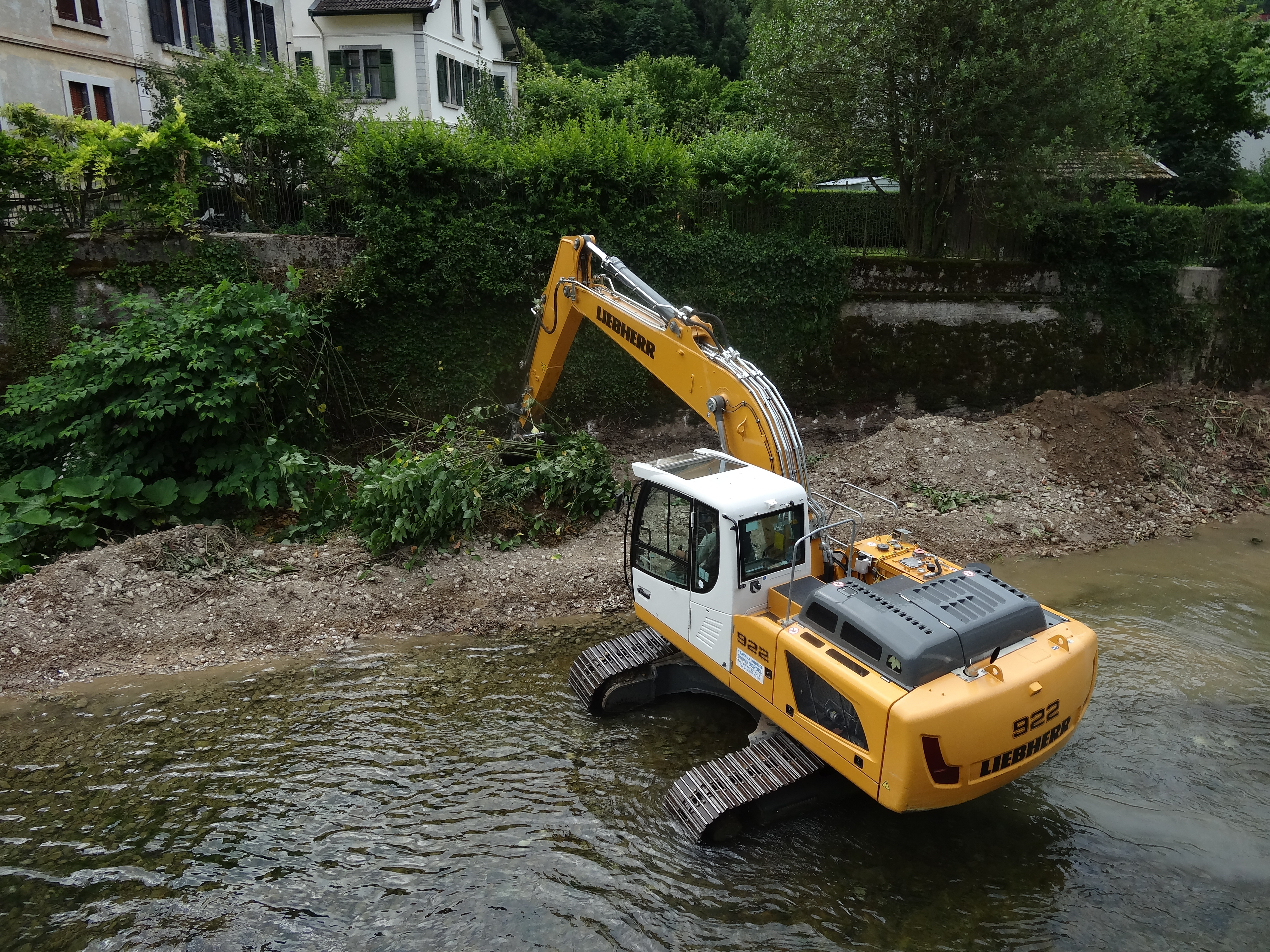 Liebherr 922 dans l'Albarine. Travaux d'aménagements et tentative d'éradication de la renouée du Japon